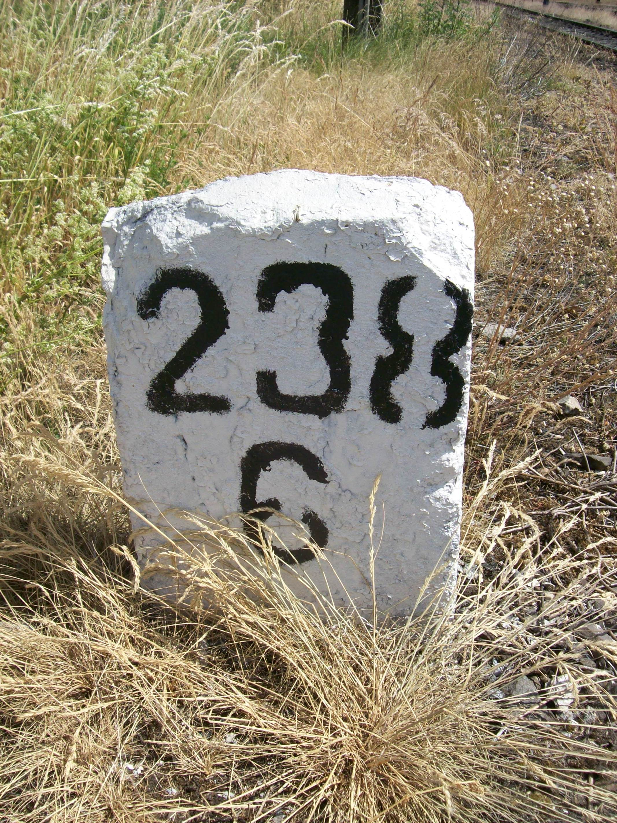 Słupek kilometrażowy na linii kolejowej 203.